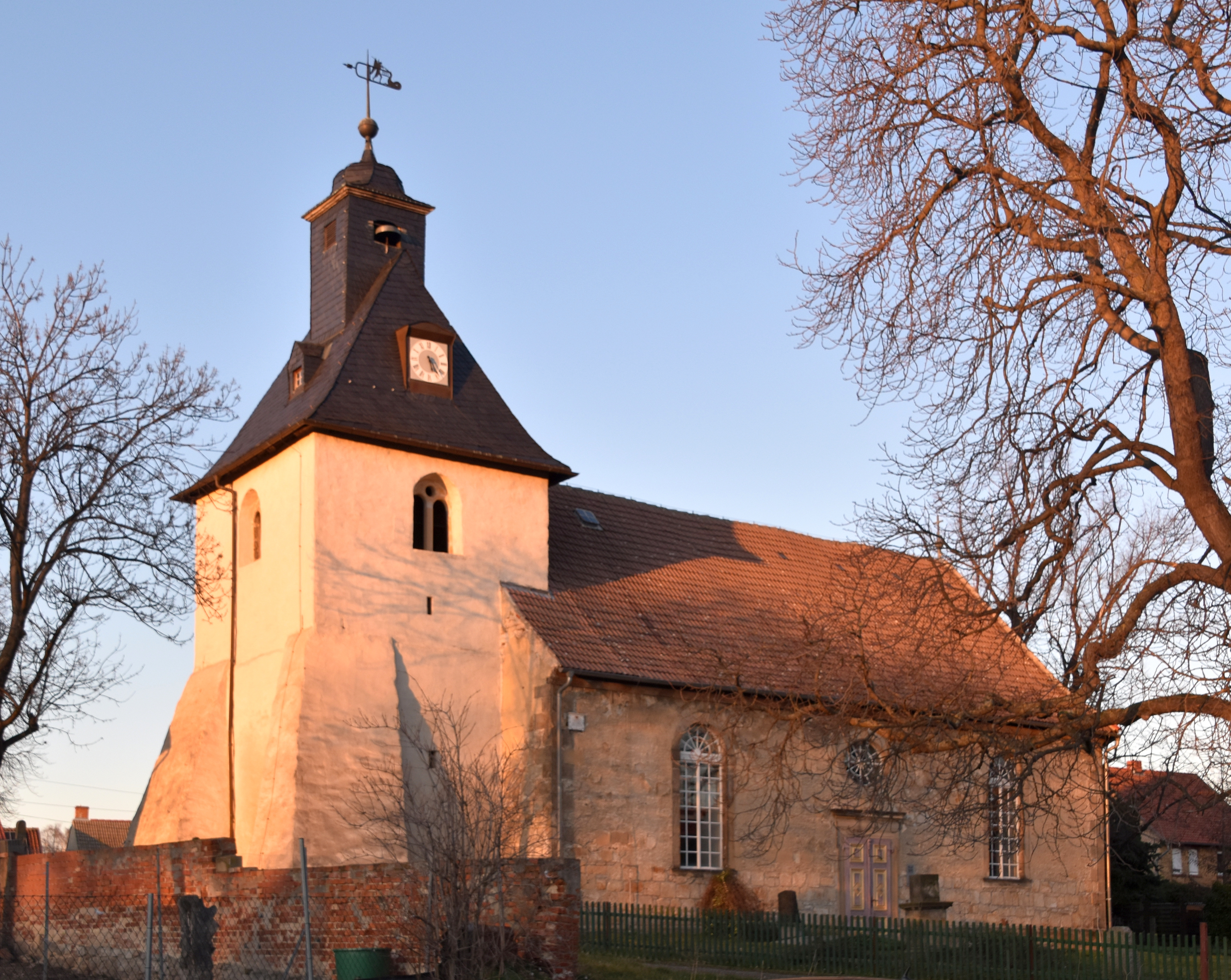 Kirche St. Michael in Weddersleben.